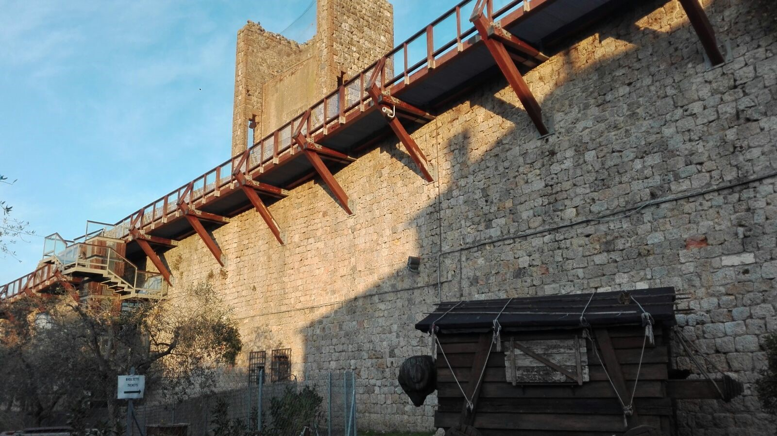 Monteriggioni